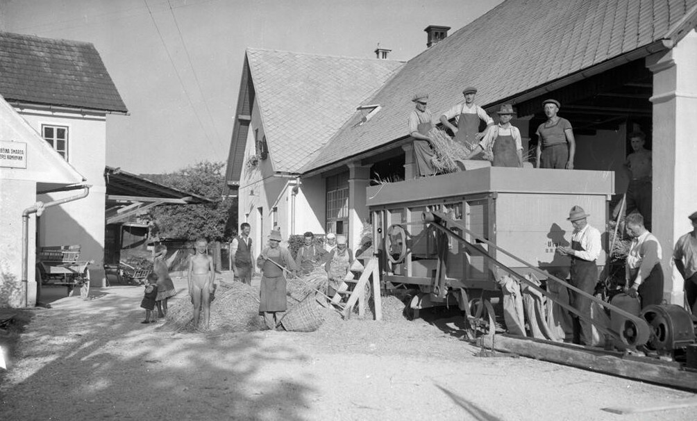 Strojna mlatev pšenice v Šmarci pri Vavpetiču.